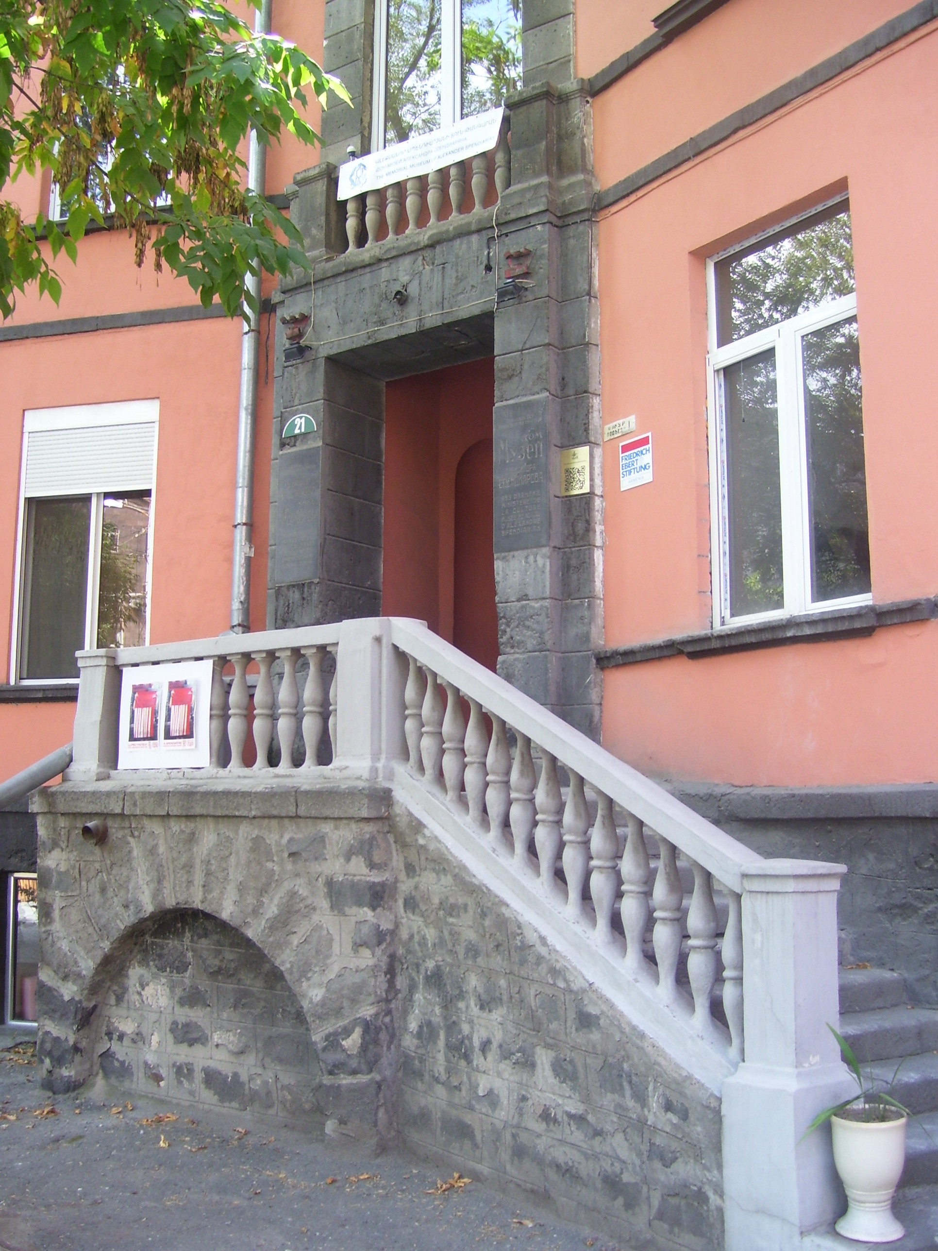 Ալեքսանդր Սպենդիարյանի տուն-թանգարան 1967 թ. Նալբանդյան փող. 21 6/46.2